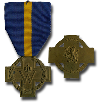 Cross of Merit 1941 Spink